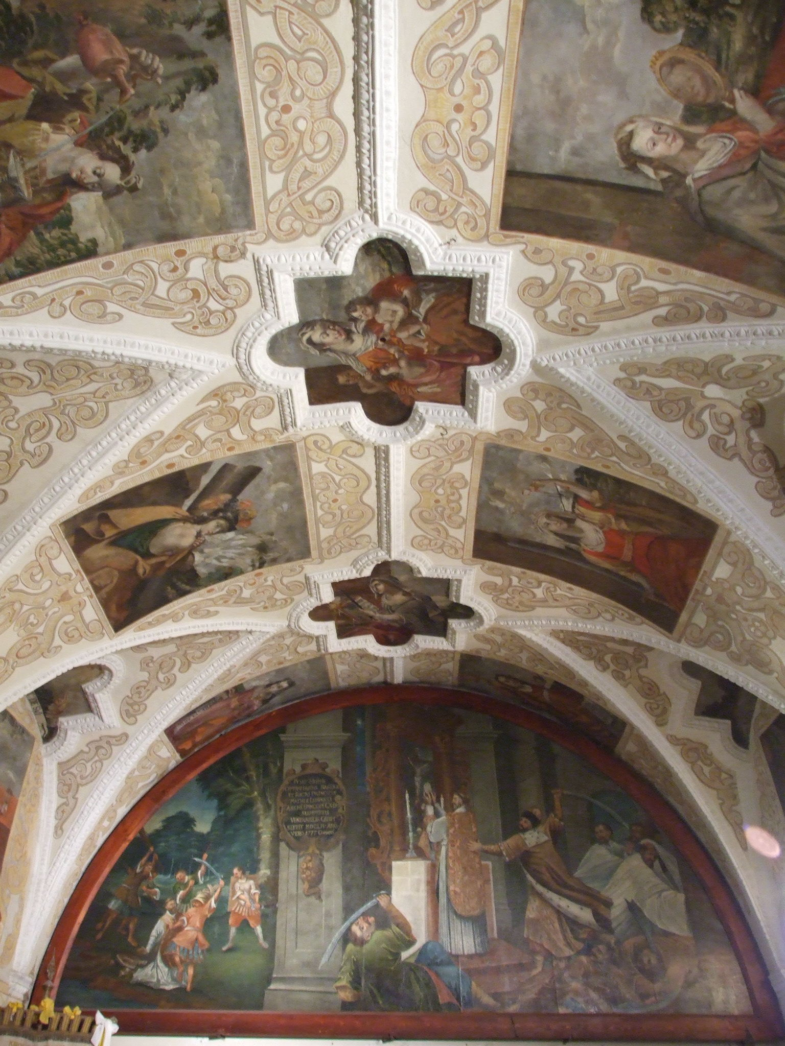 Gniezno - Katedra pw. Wniebowzięcia NMP i św. Wojciecha. Stary kapitularz. W dali XVIII-wieczna kopia obrazu "Śmierć św. Stanisława"